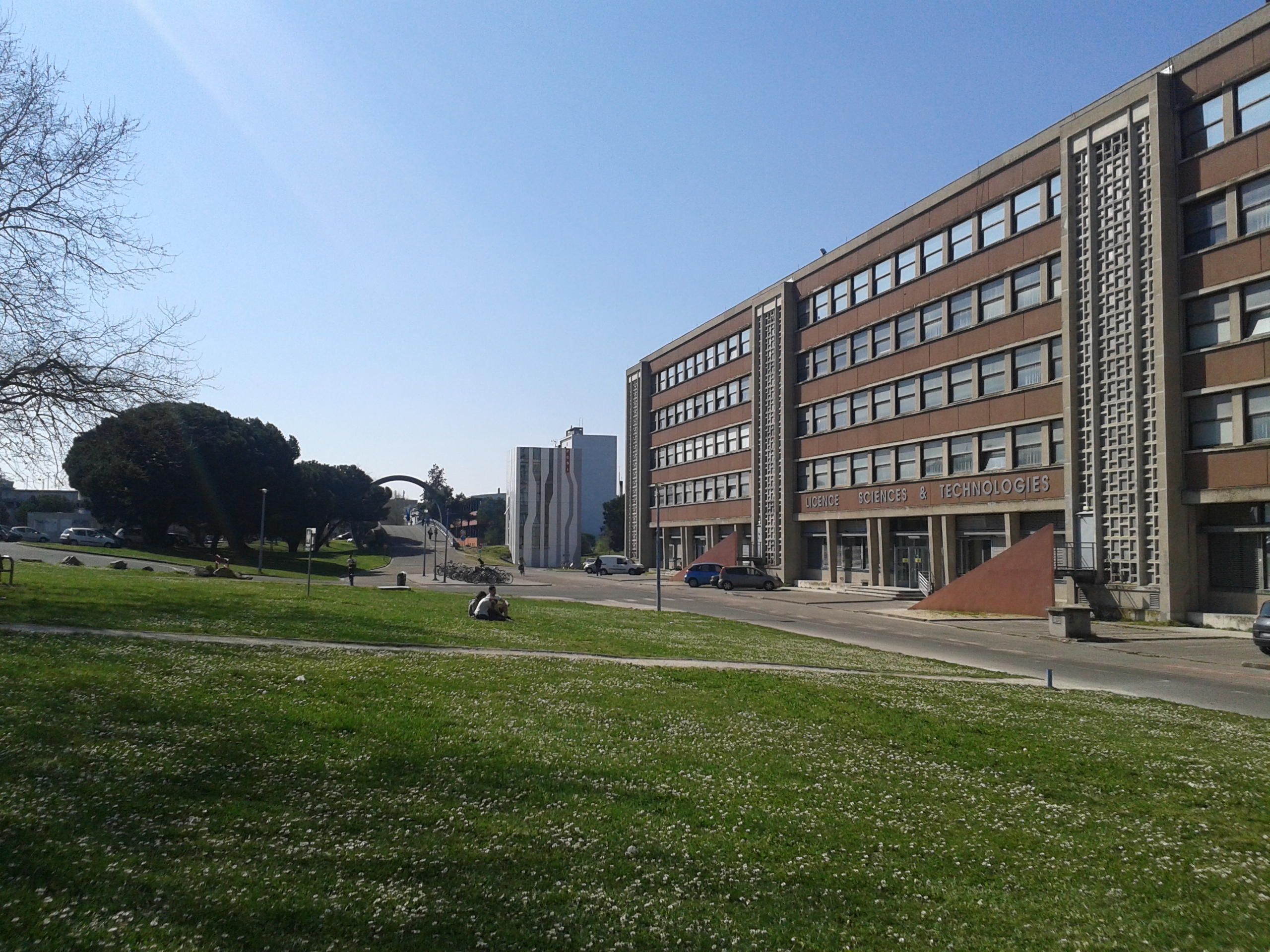 Campus de l'université de Bordeaux 1 à Talence (France).